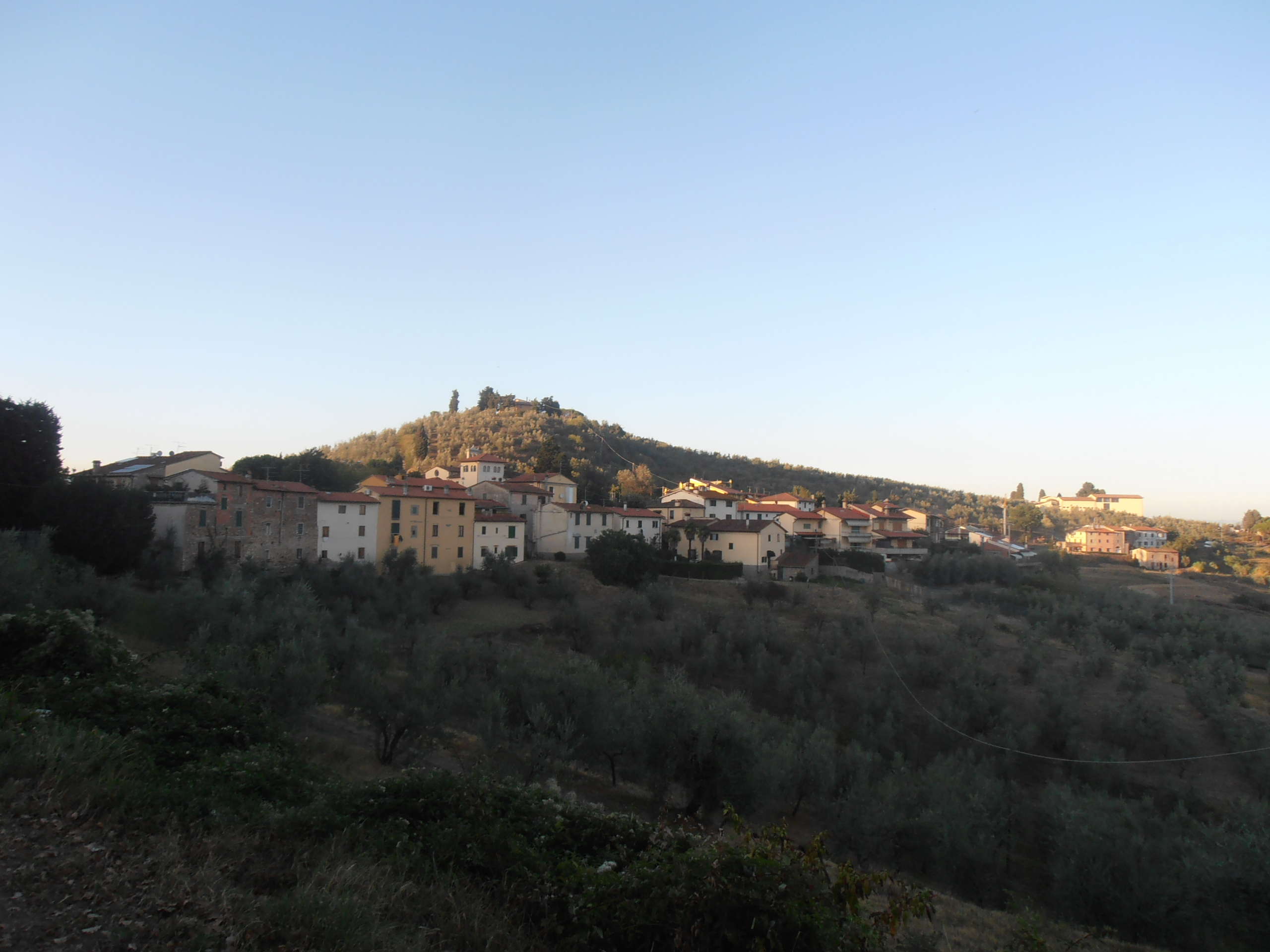 Vista della frazione di S.Cristina a Mezzana (Carmignano-PO)